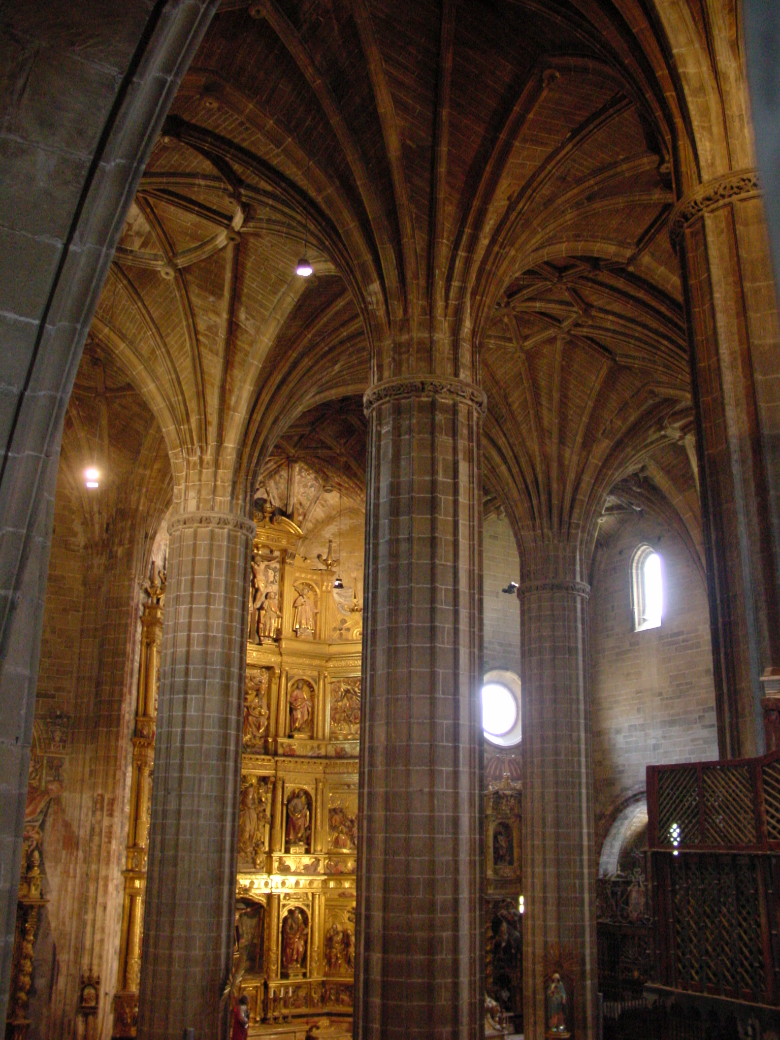 Iglesia de Nuestra Señora de la Asunción en Briones, La Rioja (España). Pilares y bóvedas; al fondo el retablo mayor.